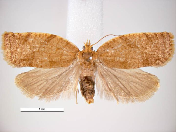 Adoxophyes orana female